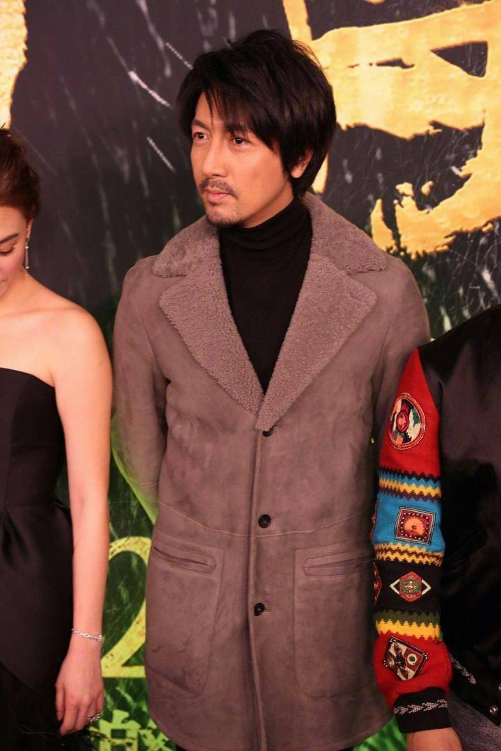 新鲜的张鱼旦老师，想哭 (张鲁一)